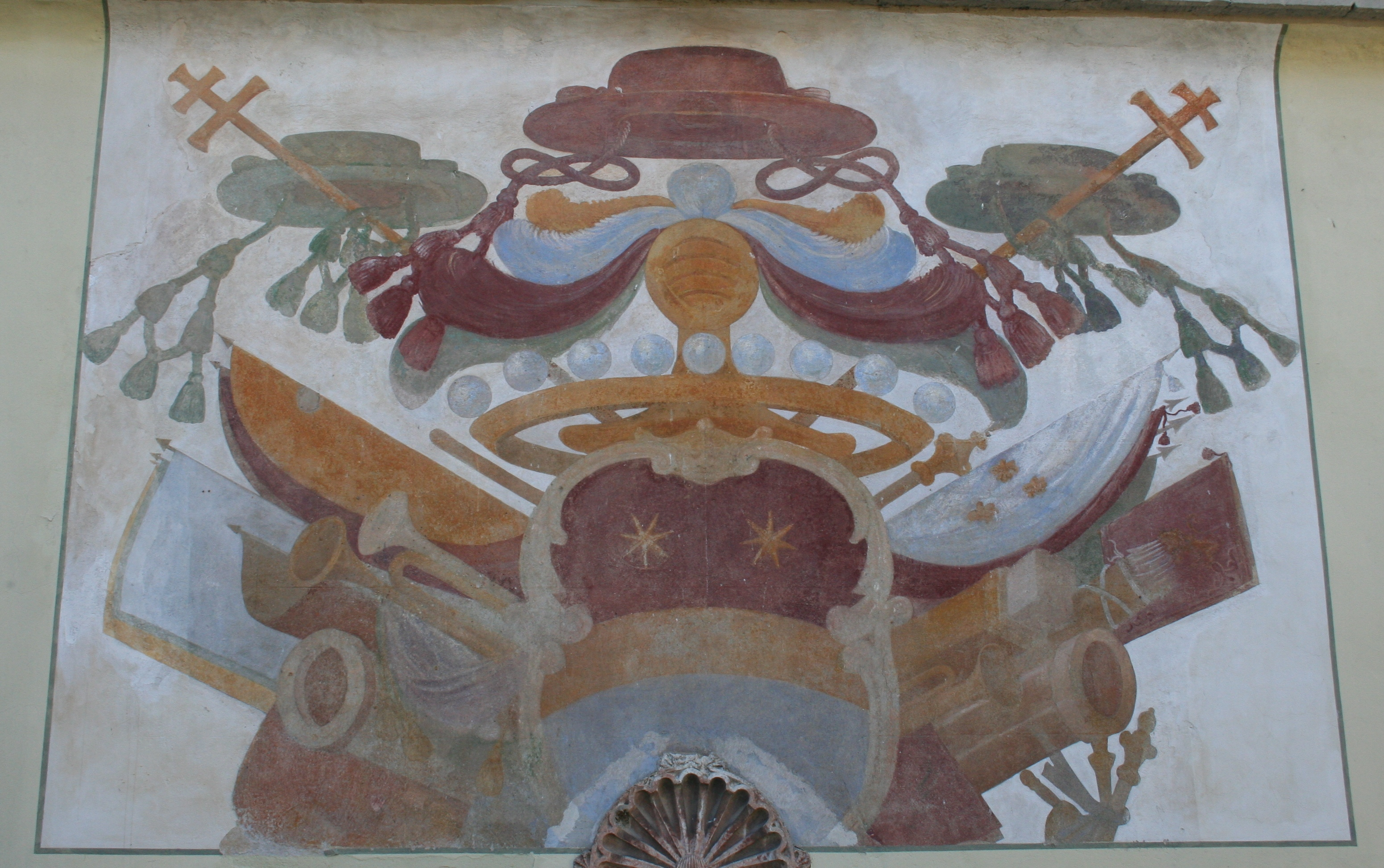 fotografia propria, Stemma della famiglia Albani, affrescato nel cortile centrale della villa